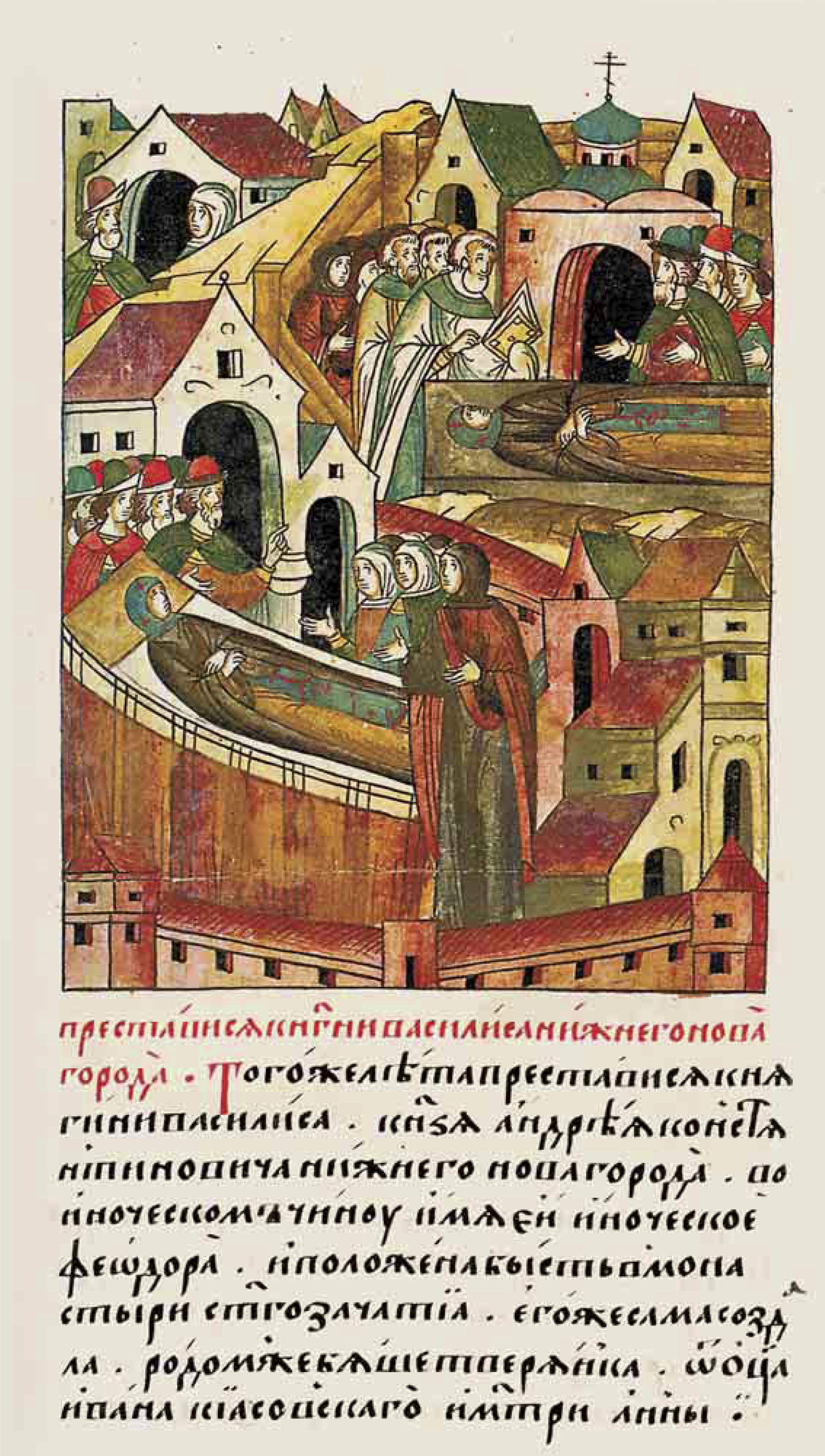 ЛИЦЕВОЙ ЛЕТОПИСНЫЙ СВОД Преставилась княгиня Нижнего Новгорода Василиса. В том же году преставилась в иноческом чине княгиня Василиса, жена князя Нижнего Новгорода Андрея Константиновича, ее иноческое имя было Феодора, похоронена она была в монастыре святого Зачатия, который она сама и построила. Родом она была из Твери, отец ее — Иван Киасовский, а мать — Анна.